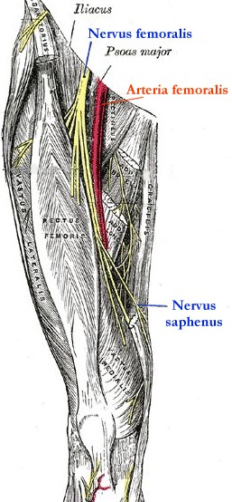 Nervus femoralis, Image:Gray827.png, nachbearbeitet und Beschriftung modifiziert (Deutsch/german) von Benutzer:Uwe Gille